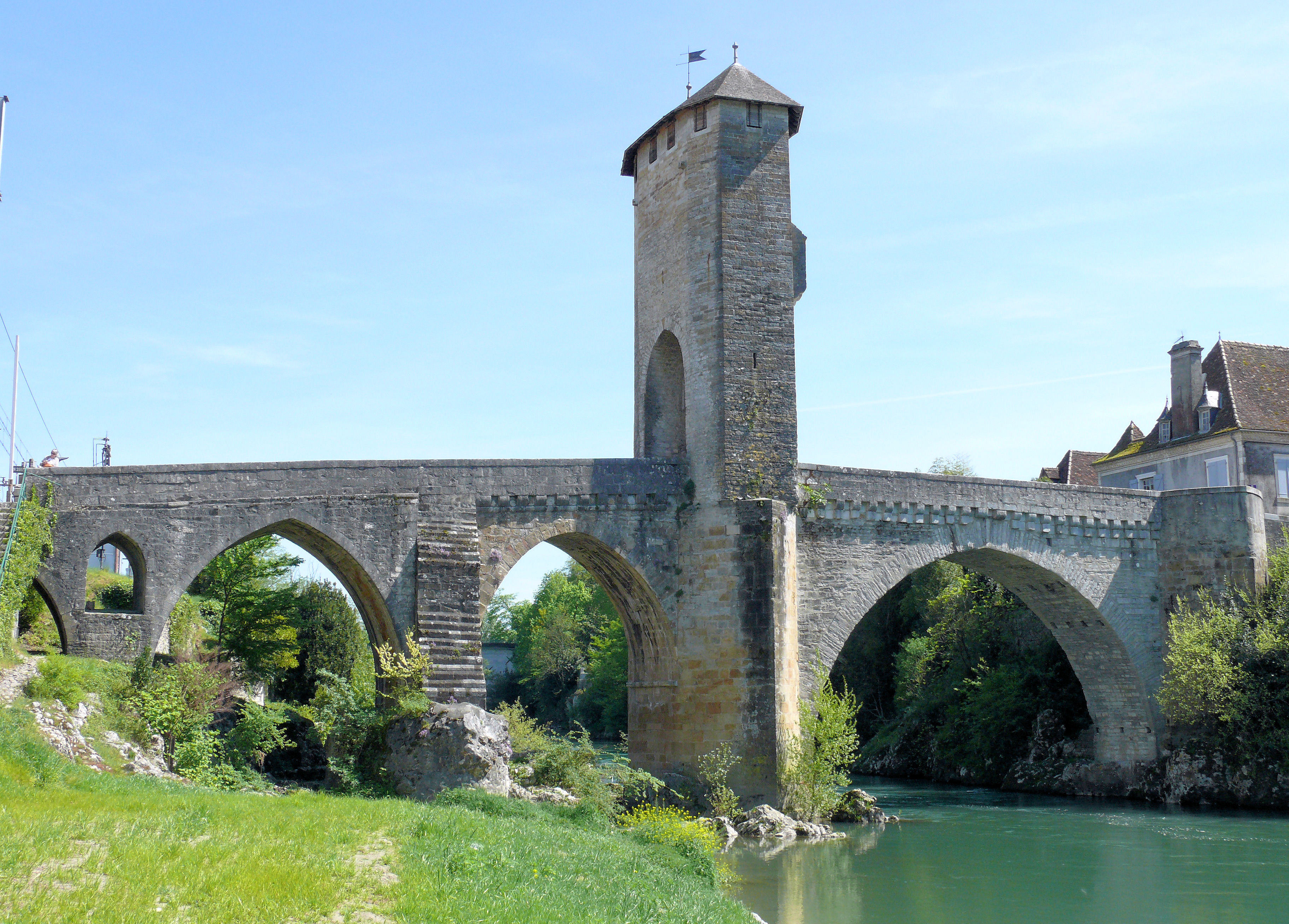 Pont-Vieux d'Orthez - Vue d'ensemble